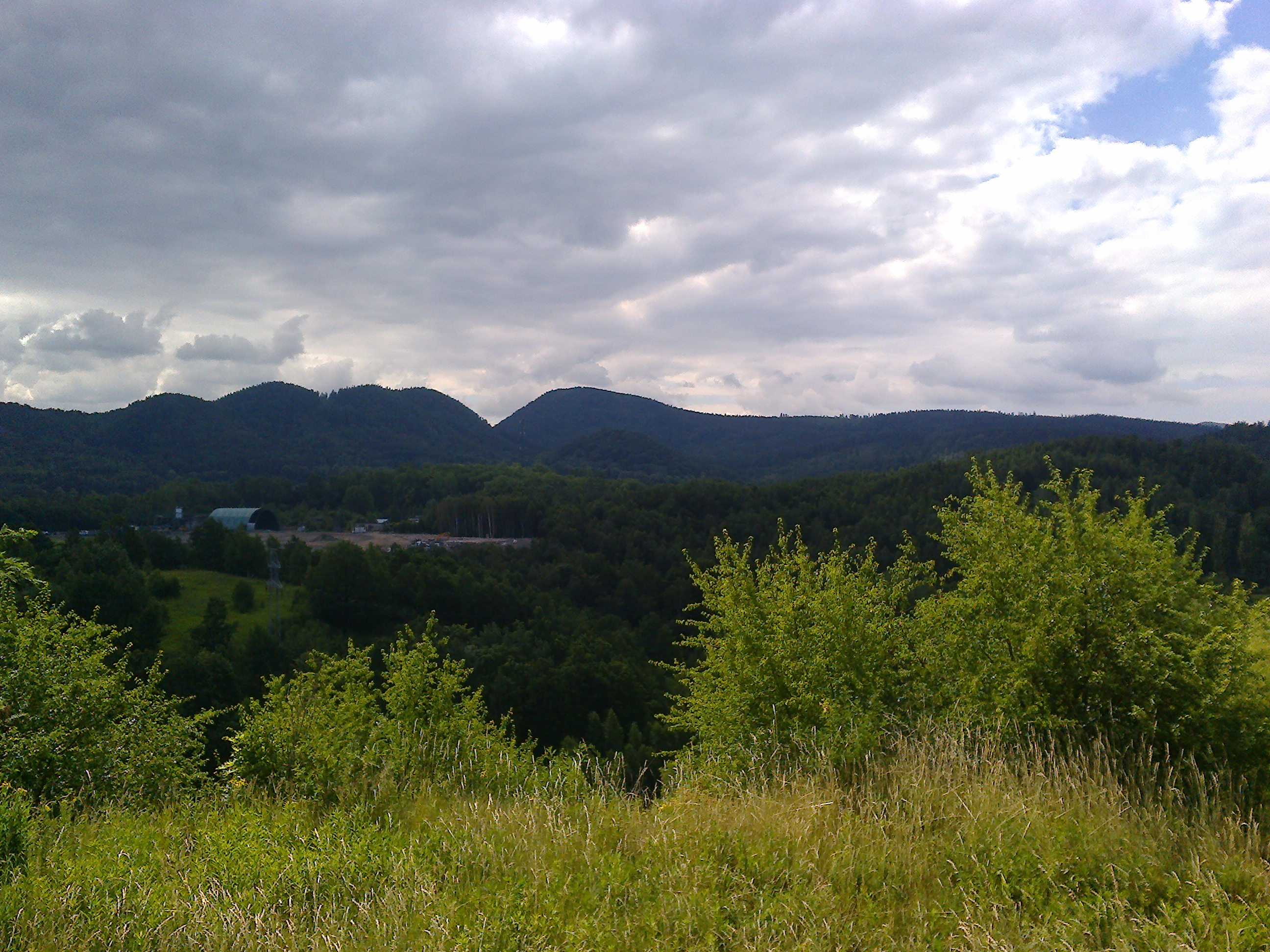 Widok na Borową Kozła Wołowca z hałdy przy ulicy Matejki w Wałbrzychu